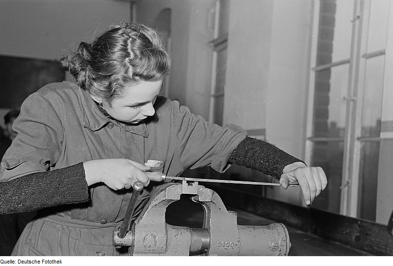 Original image description from the Deutsche Fotothek Porträt eines Lehrlings an einer Werkbank